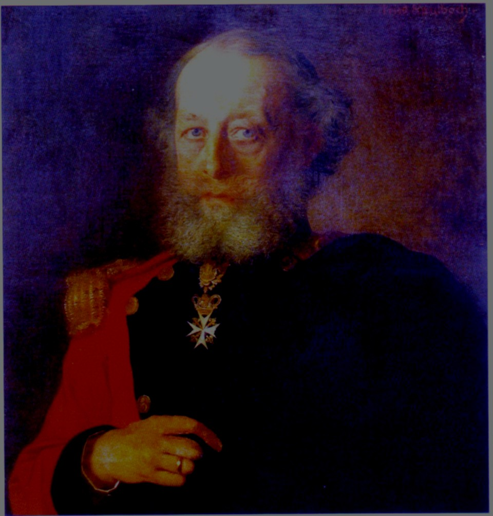 Clemens August Graf von Westphalen